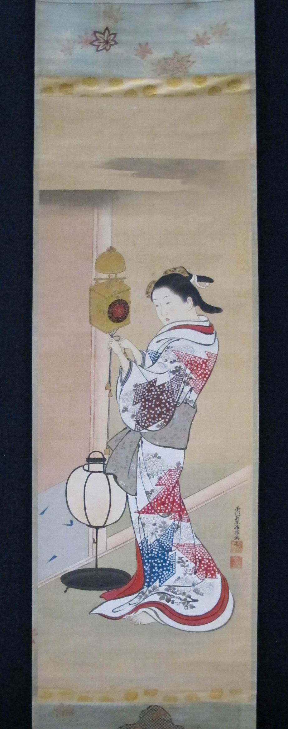 Nishikawa sukenobu, Bellezza e orologio, periodo edo, XVIII sec. Tokyo National Museum